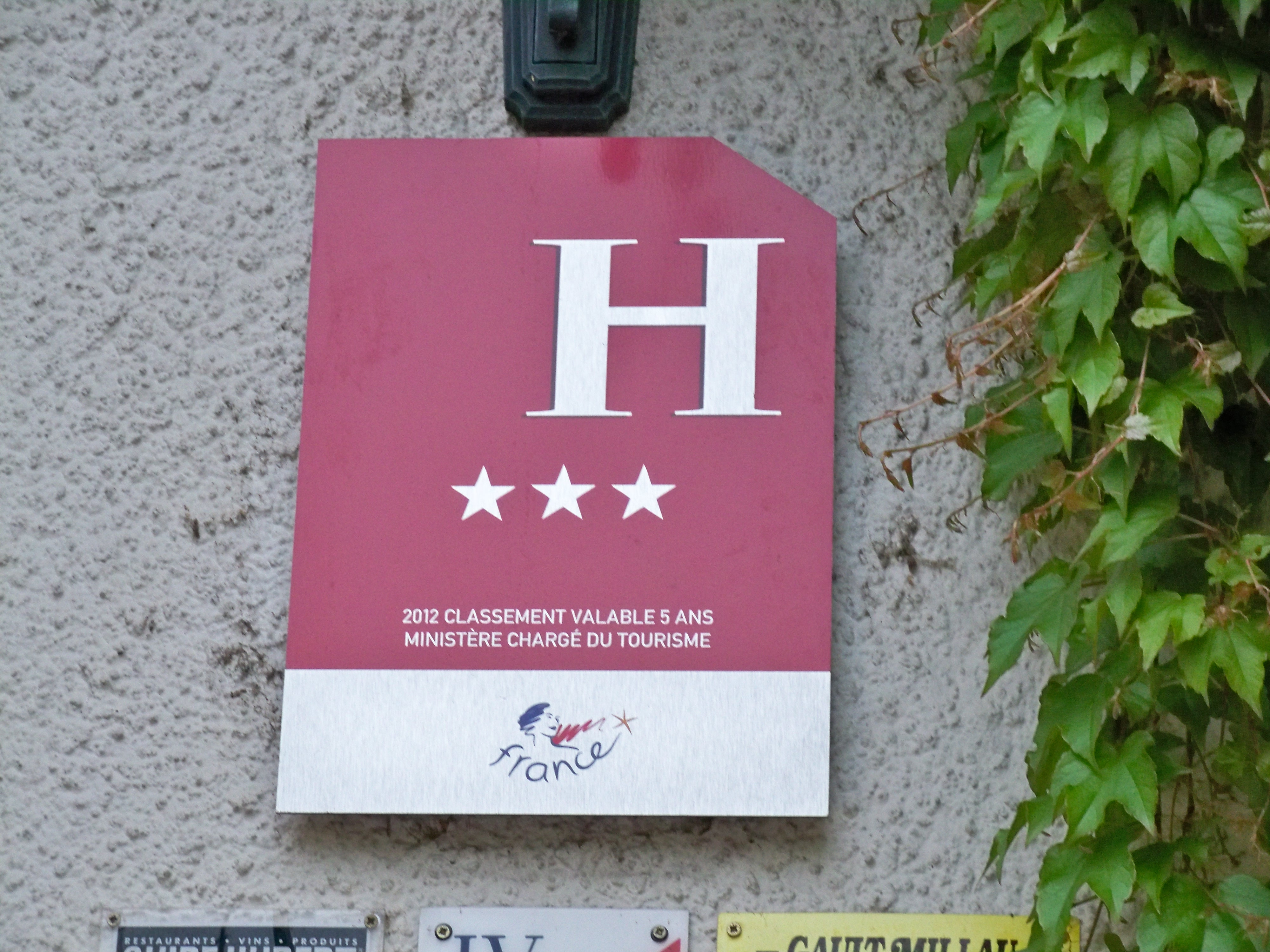 Nouvelle signalitique pour hotel 3 étoiles